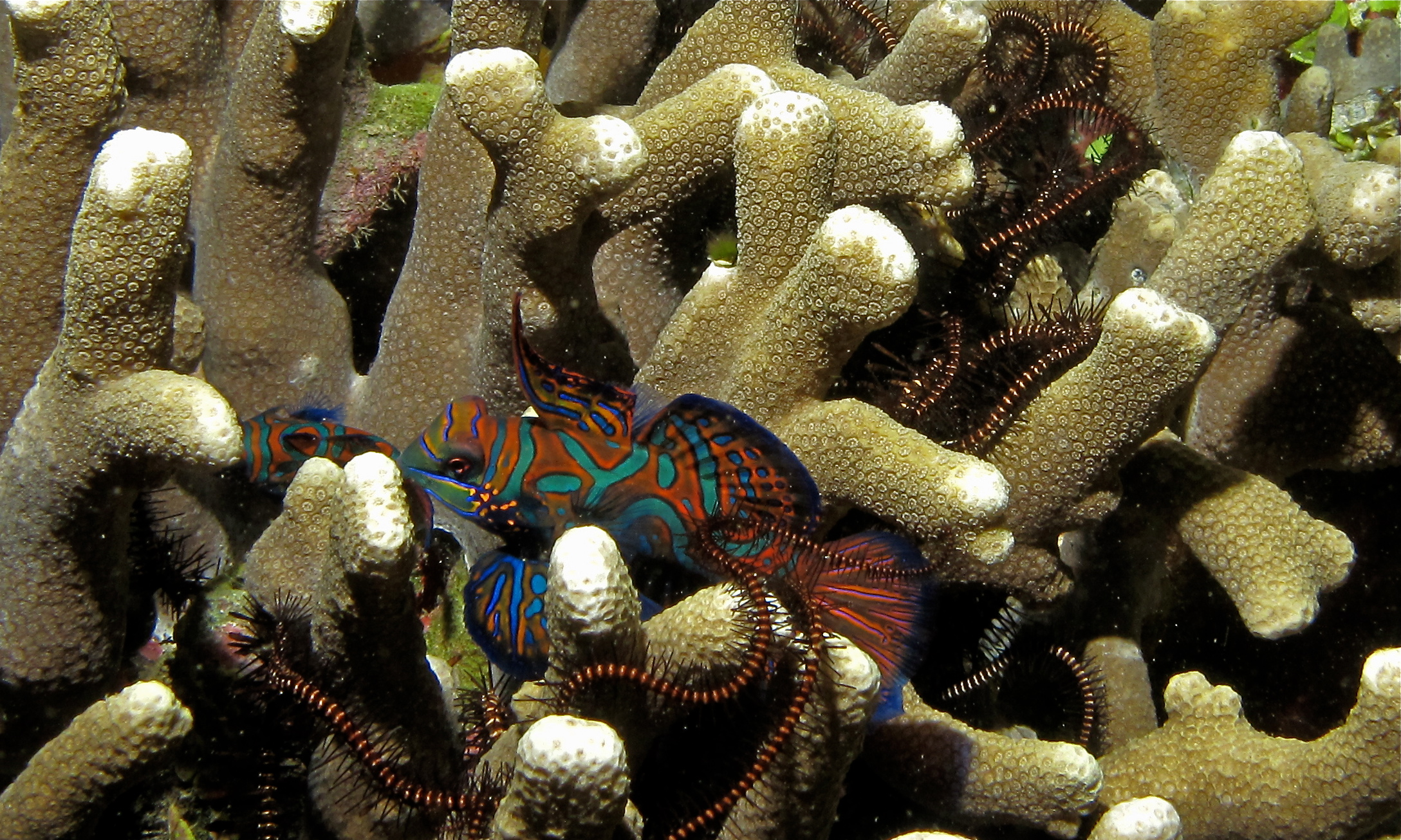 Pintu Colada, Lembeh Strait, Sulawesi, INDONESIA